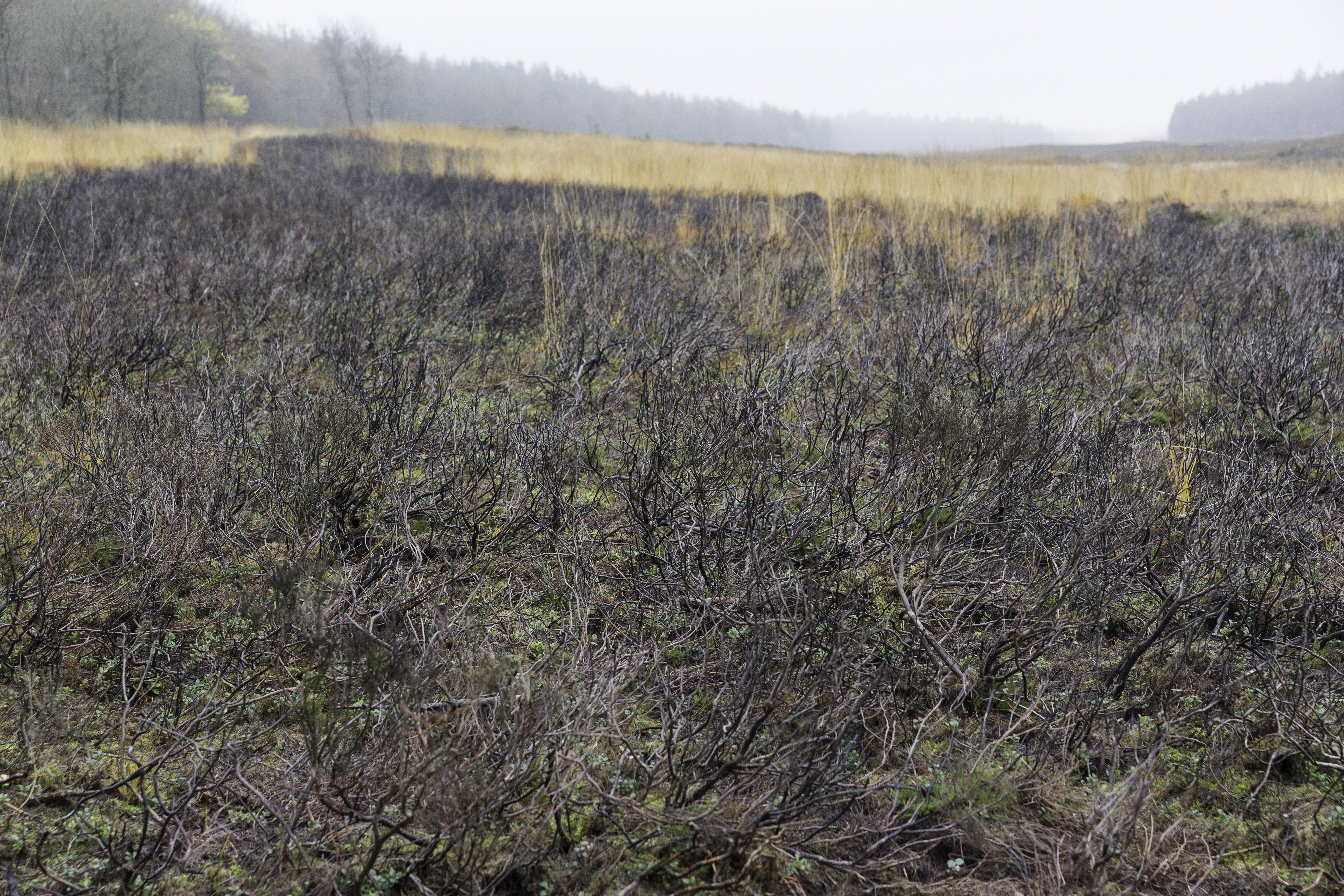 hedepleje ved afbrænding af gammel lyng